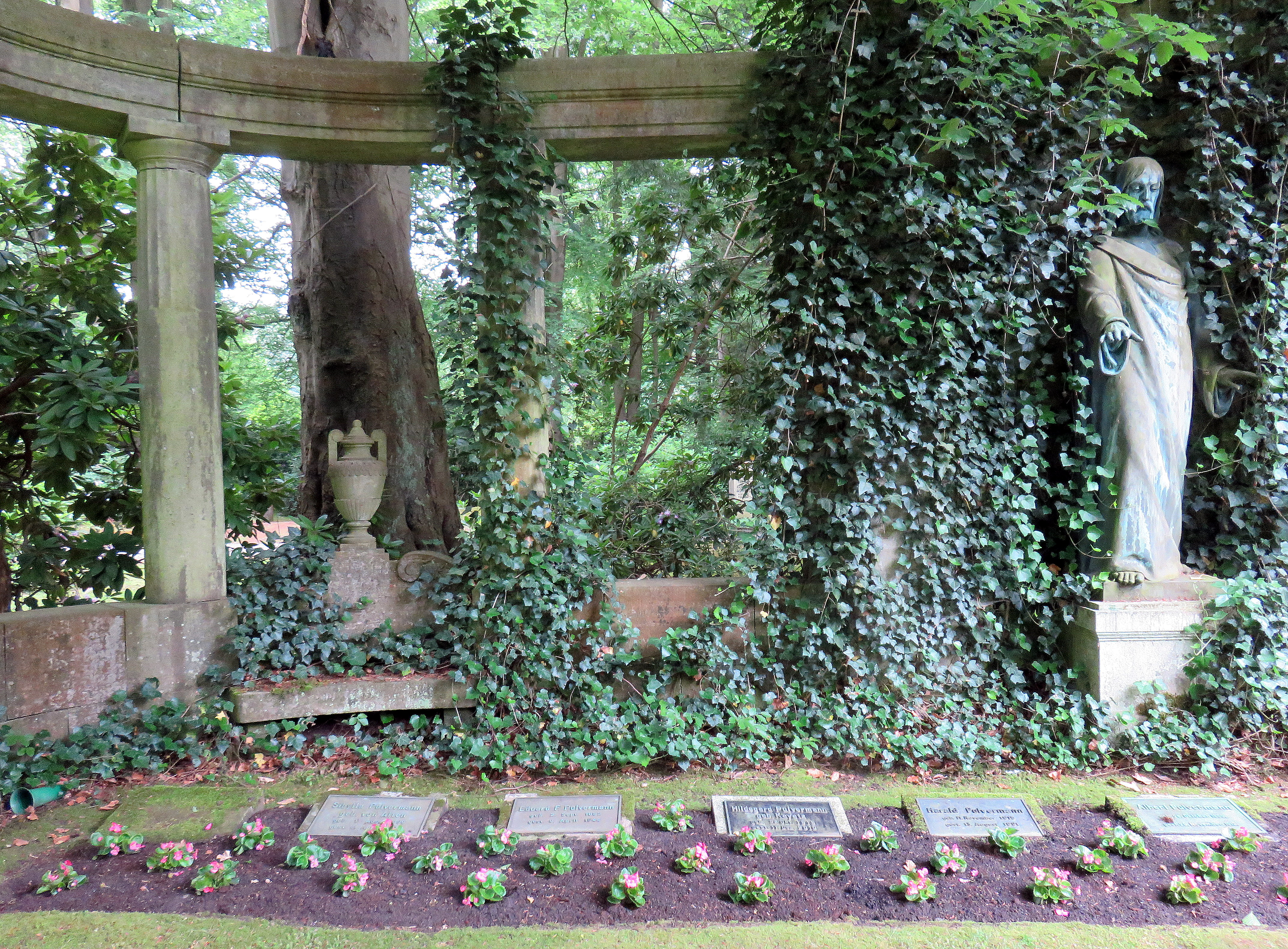 12 m breite Säulen-Grabwand für Mitglieder der Familie Pulvermann auf dem Hamburger Friedhof Ohlsdorf, Planquadrat AC 25 (südlich Kapelle 7), geschaffen 1913 vom deutschen Bildhauer Bruno Kruse Der dritte Kissenstein (von links) erinnert an den deutschen Kaufmann und Springreiter Eduard Pulvermann, nach dem 1919 ein Pferdeturnier-Hindernis benannt wurde.